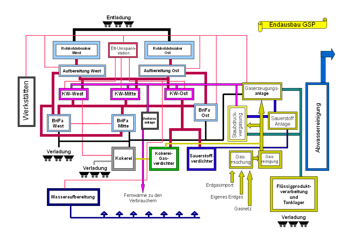 Endausbau und Vernetzung im Gaskombinat Schwarze Pumpe (bis 1989)